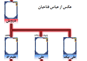 پسران درویش - لشکرخان